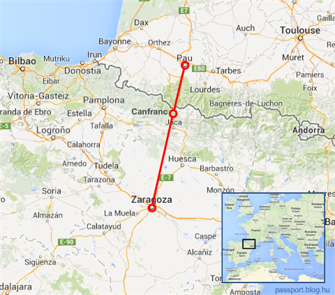 Zaragosa - Canfranc - Palu egykori vasútvonal vázlata